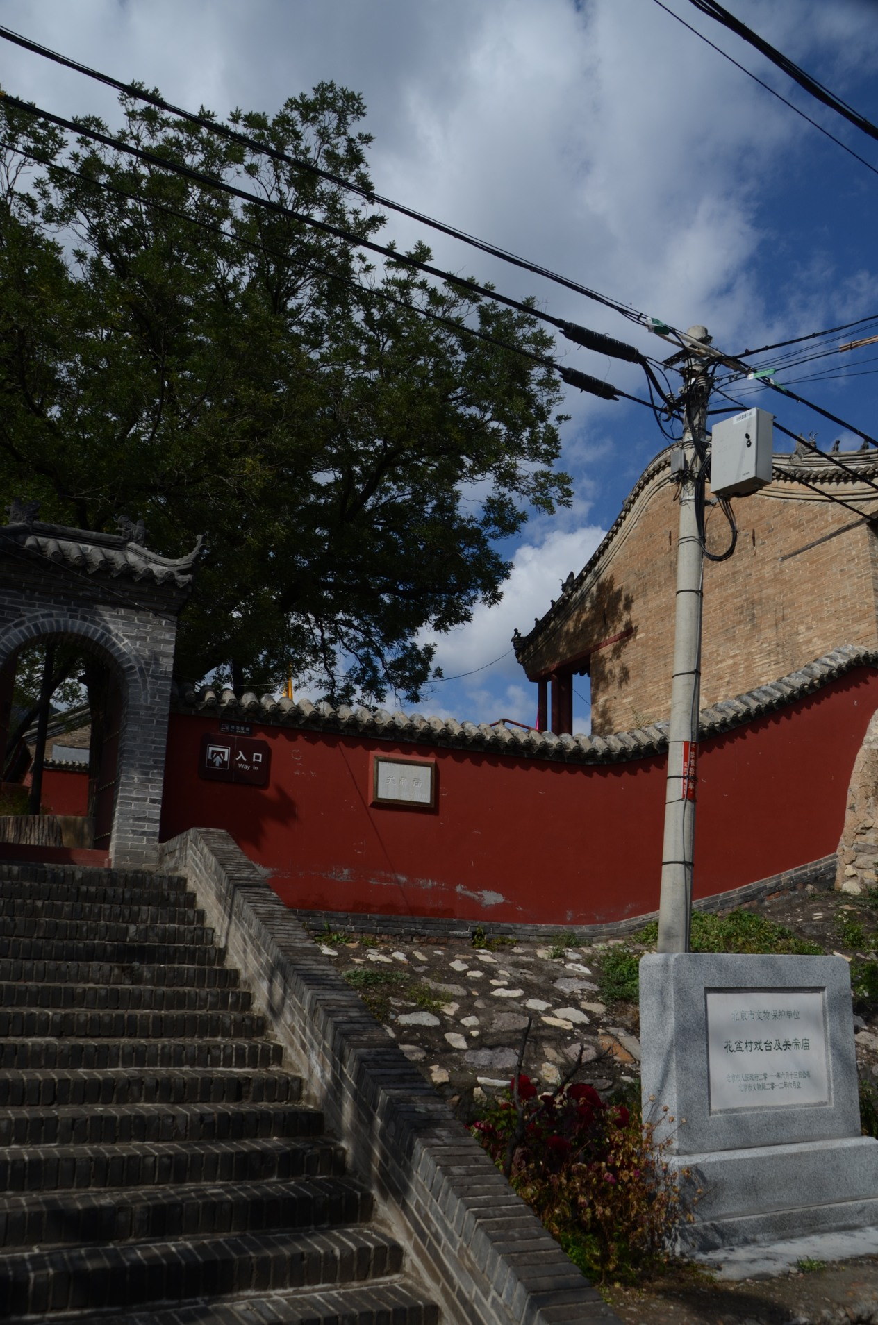 关帝庙